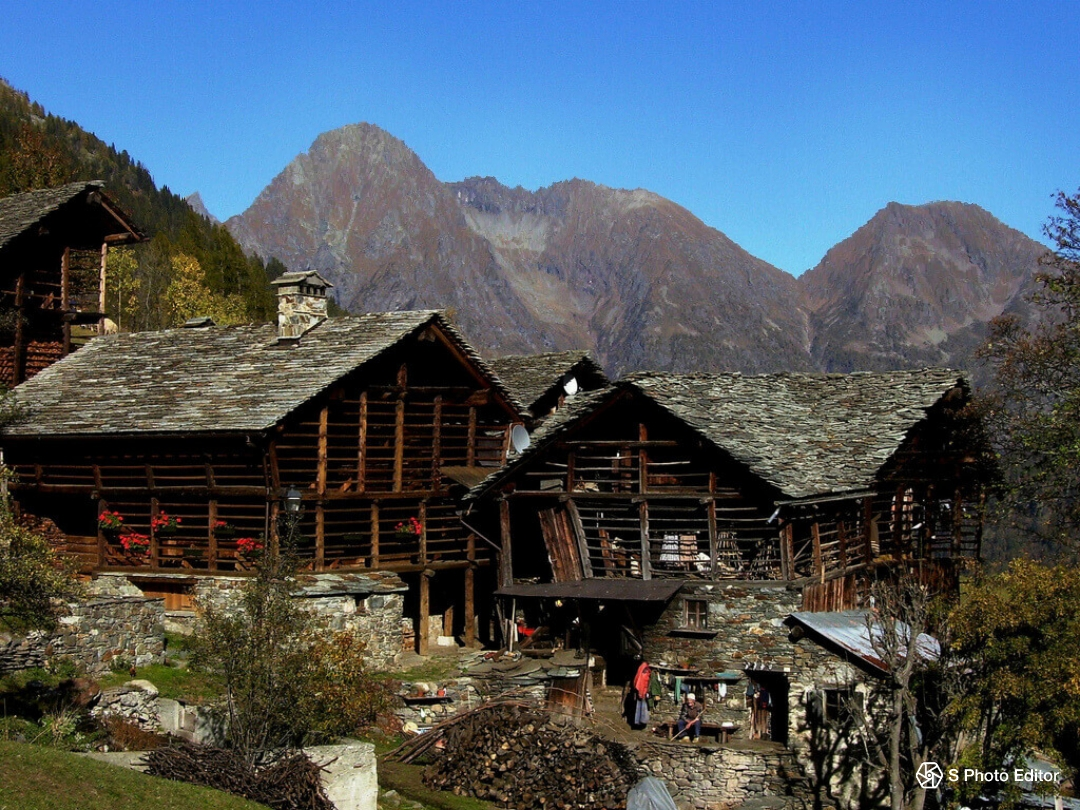 Villaggio antico medievale in Valsesia